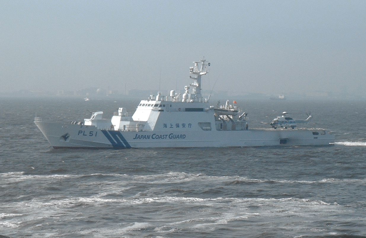 海上保安庁 巡視船 PL51「ひだ」 第51回海上保安庁観閲式にて 投稿者Sizuruが撮影 Japan Coast Guard(JCG) PL51 Hida